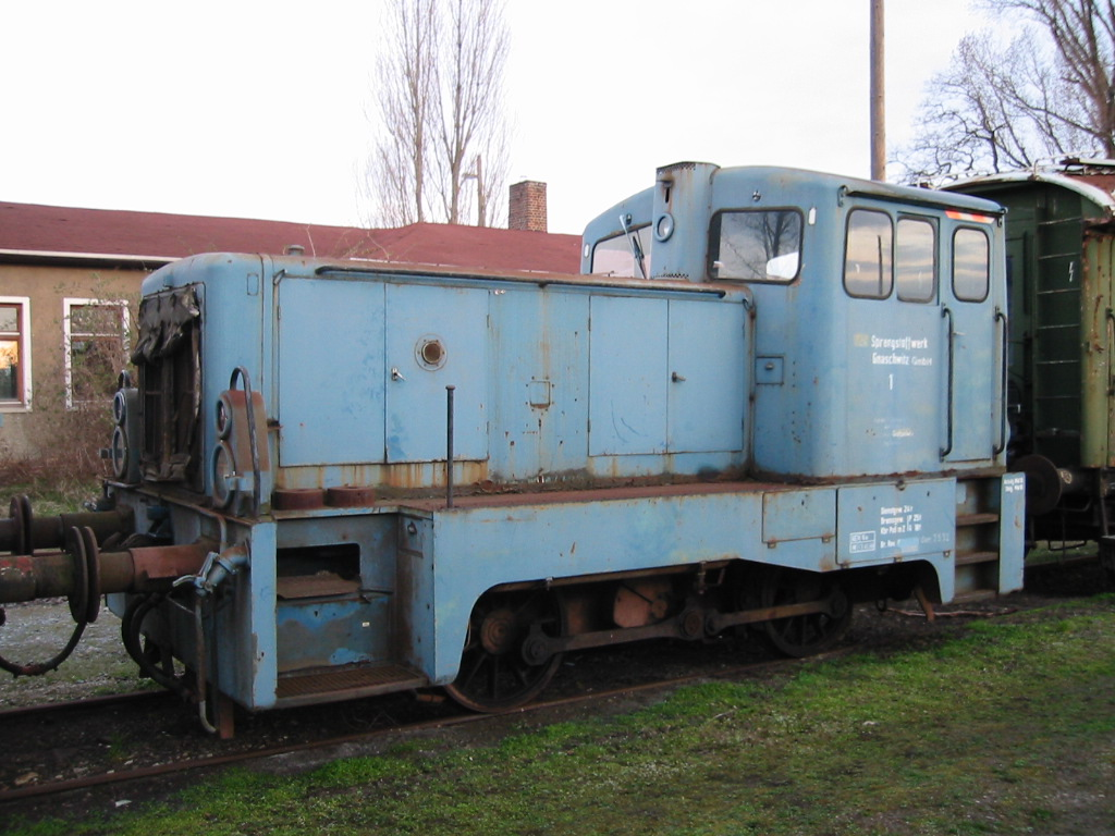 LKM V 22 B 262657 in Staßfurt